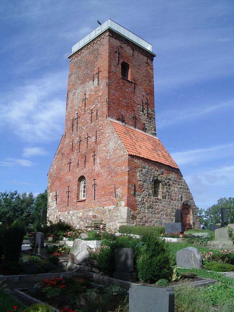 Ochsenturm, vermutlich Kirchturm der Bartholomäuskirche von 1218. Die Kirche wurde 1878 wegen Baufälligkeit abgebrochen, der Turm diente weiterhin als Landmarke für die Weserschiffahrt. 1897 wurde die Dachspitze abgenommen und der Kopf mit einer Betondecke abgedeckt. Seit dem dient das "Wahrzeichen" von Imsum (Stadt Langen) als Aussichtsturm (1990 überholt). Foto von Benutzer:Geoz 2005